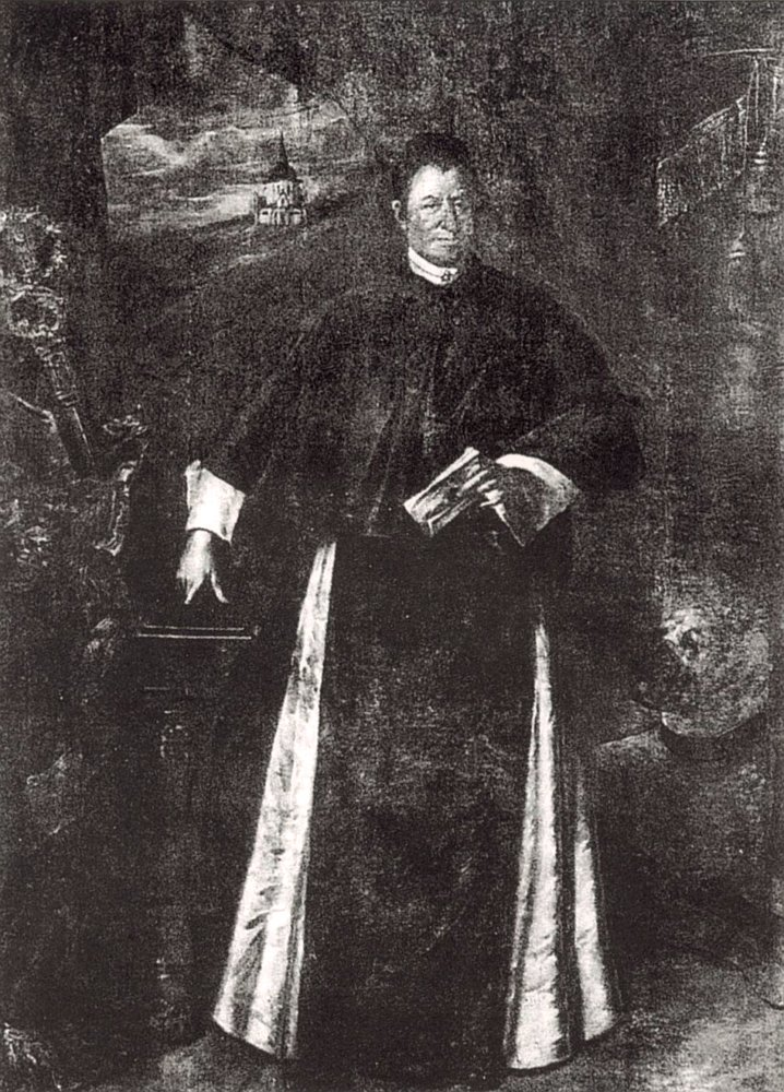 Portét opata Václava Vejmluvy, asi 1722-1725 Opat Václav Vejmluva se narodil 19. září 1670 v rodině Jana Vejmluvy, sládka v pivovaře kláštera cisterciaček na Starém Brně. Jako osmnáctiletý, dne 1. ledna 1689 vstoupil do noviciátu ve Žďárském klášteře.